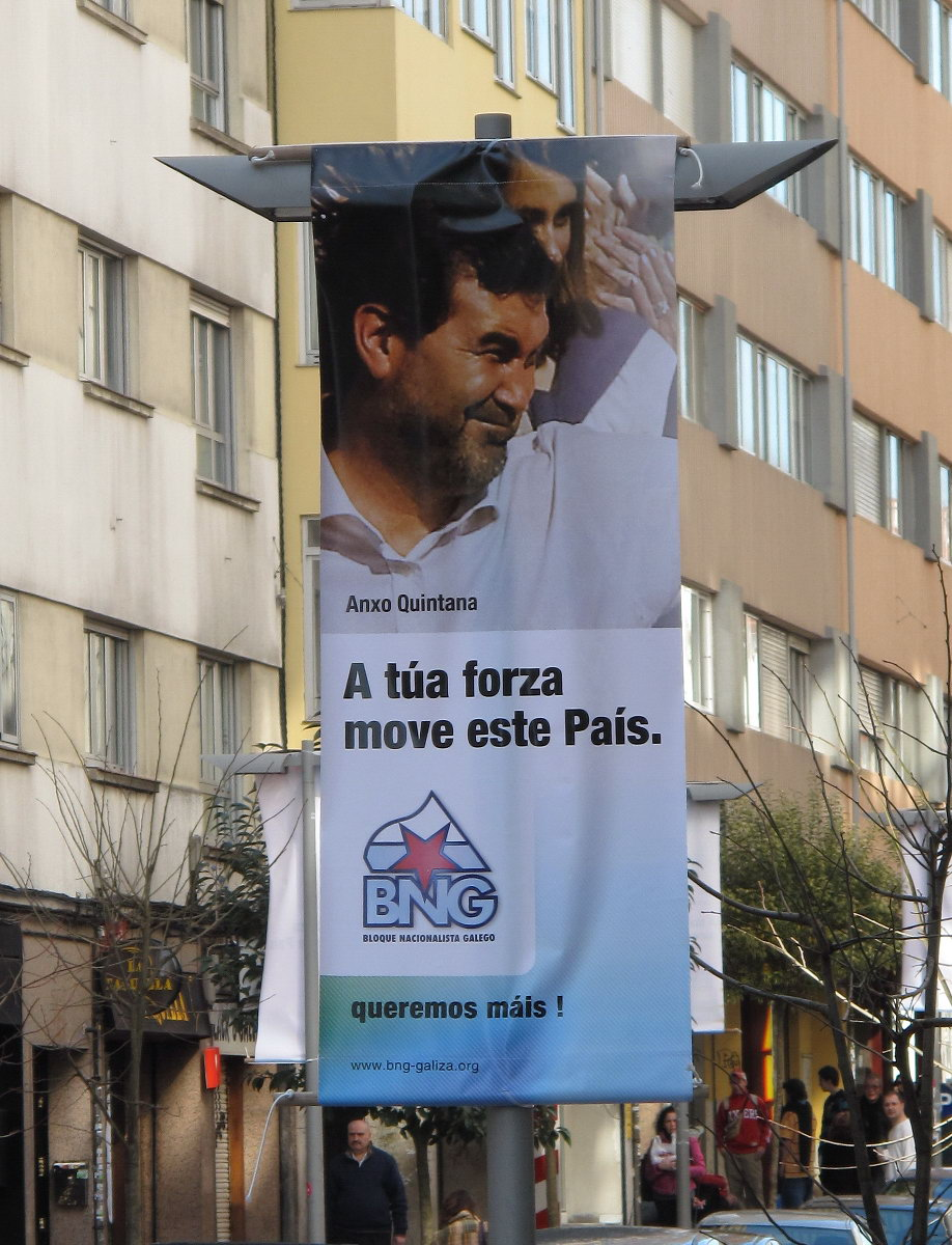 Panneau à Saint-Jacques de Compostelle du BNG (Bloque Nacionalista Galego) pour la campagne électorale du 1er mars 2009 au Parlement de Galice - Anxo Quintana était candidat à la présidence du gouvernement autonome.